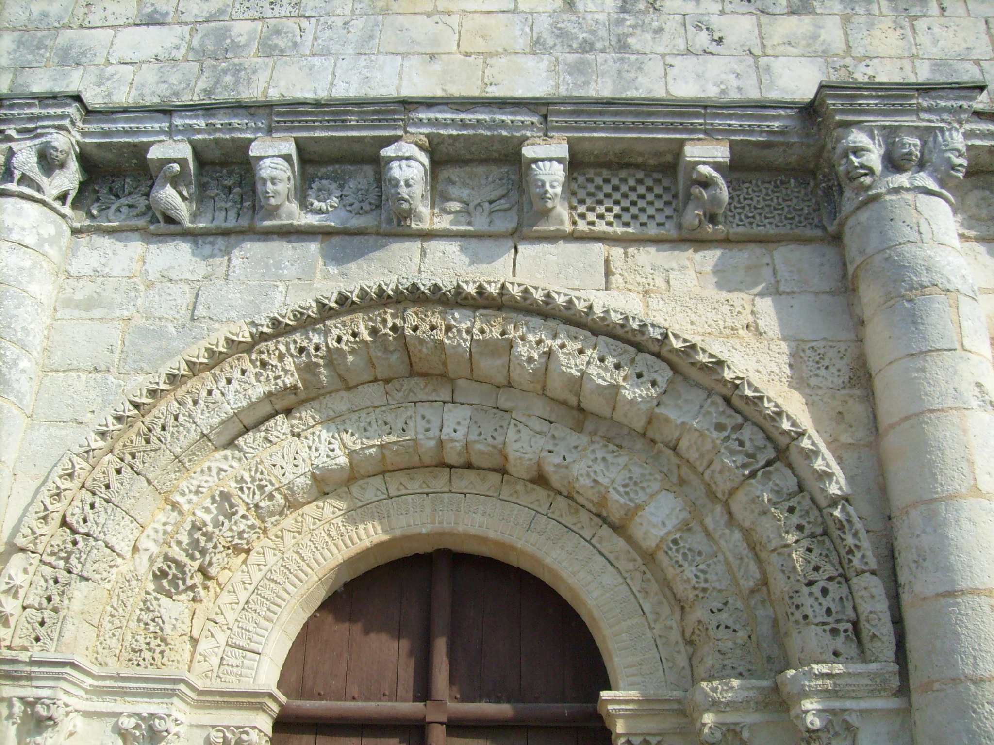 Voussures du portail, église de Rétaud